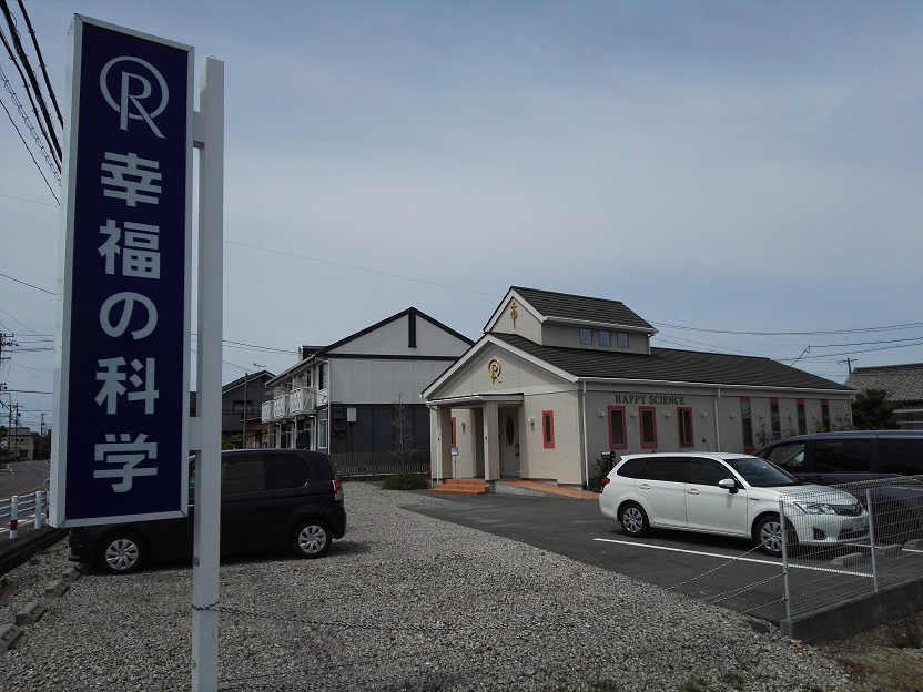 Happy Science in Nishio